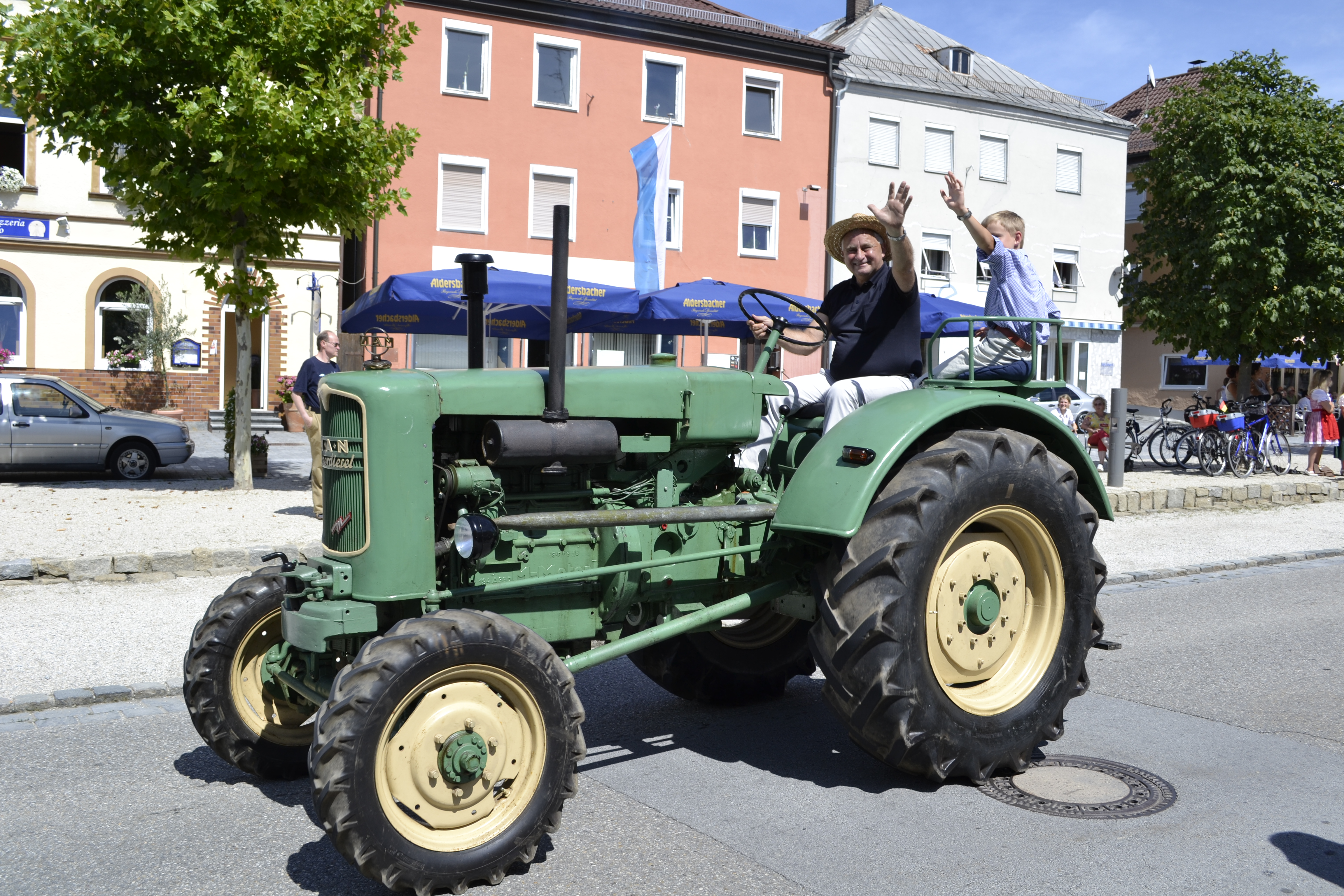 Ein MAN Ackerdiesel beim Oldtimerumzug in Aidenbach, gefahren von Karl Obermeier, Bürgermeister von Aidenbach.